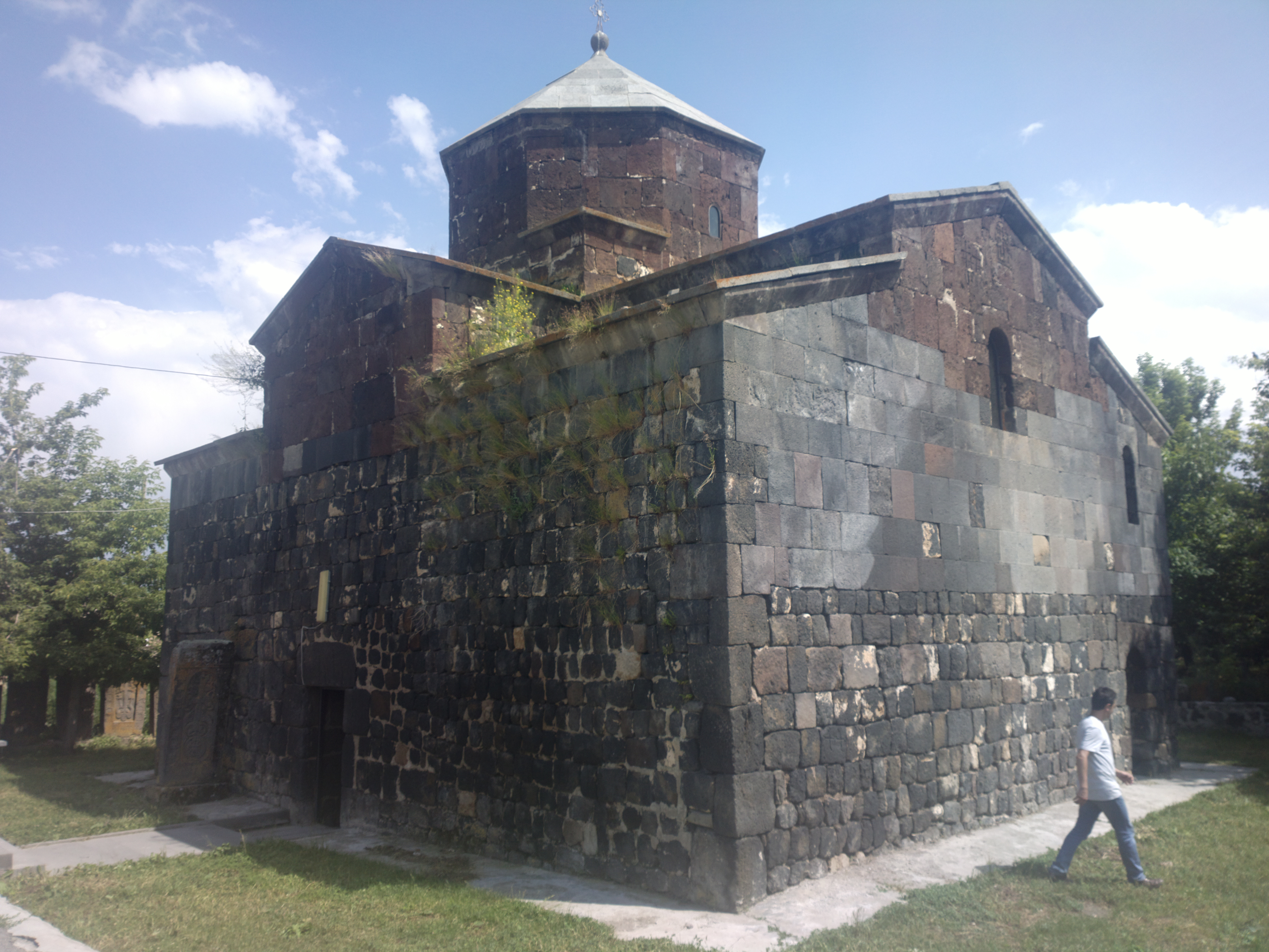 Եկեղեցի «Մասրուց անապատ» 60/10